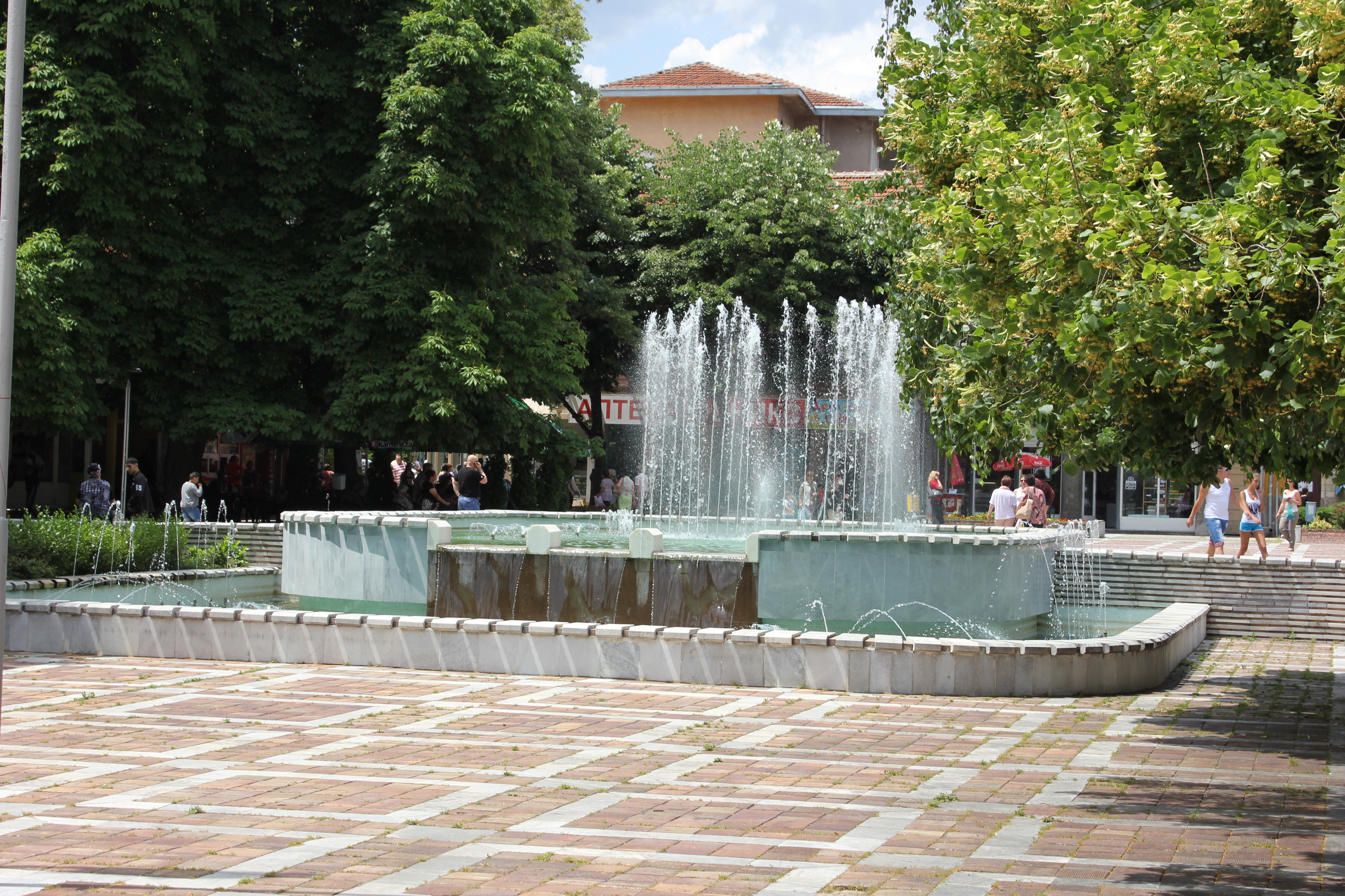 Площад „България" в град Пещера, България.